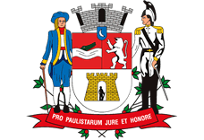 Brasão_do_Municipio_de_Jacareí-SP